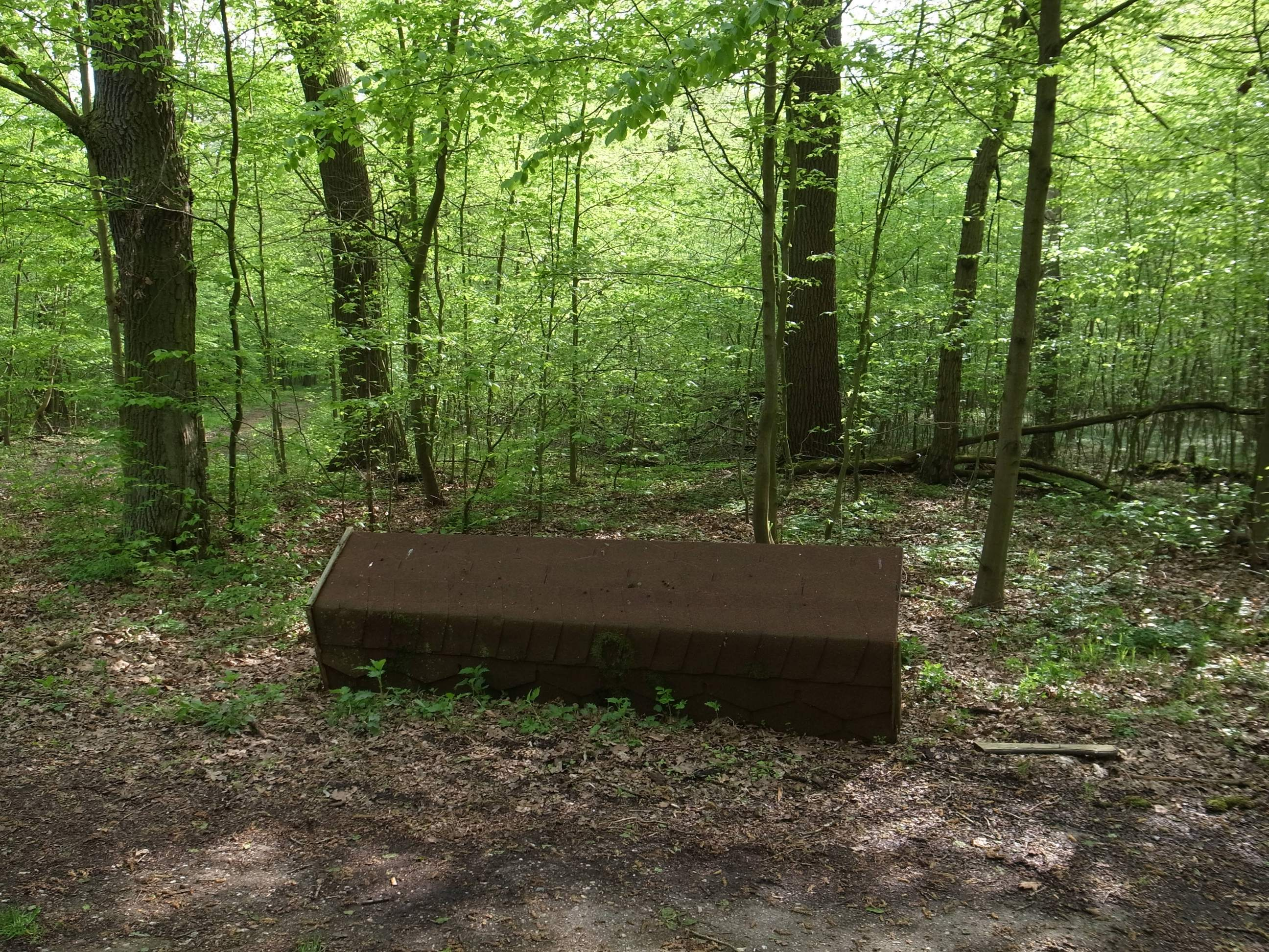 NSG "Möster Birken", Informationstafel